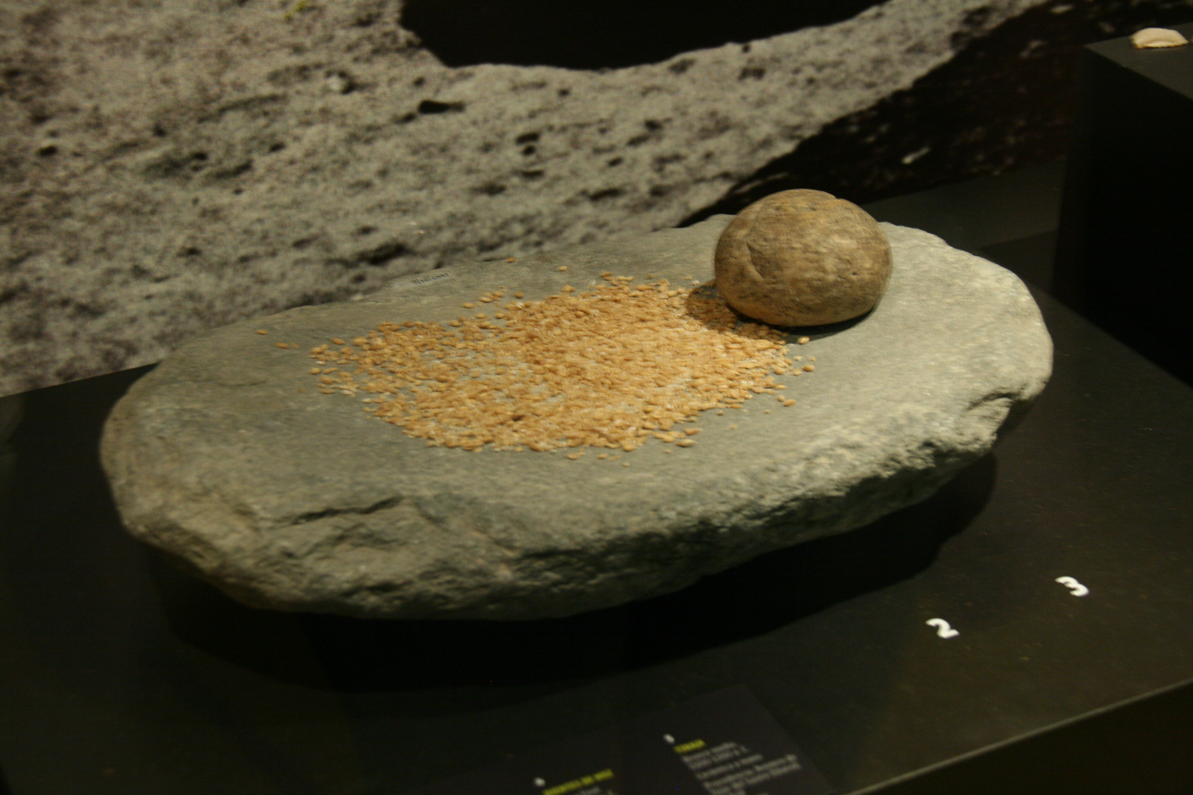 Molino de piedra, con muestra de grano para moler